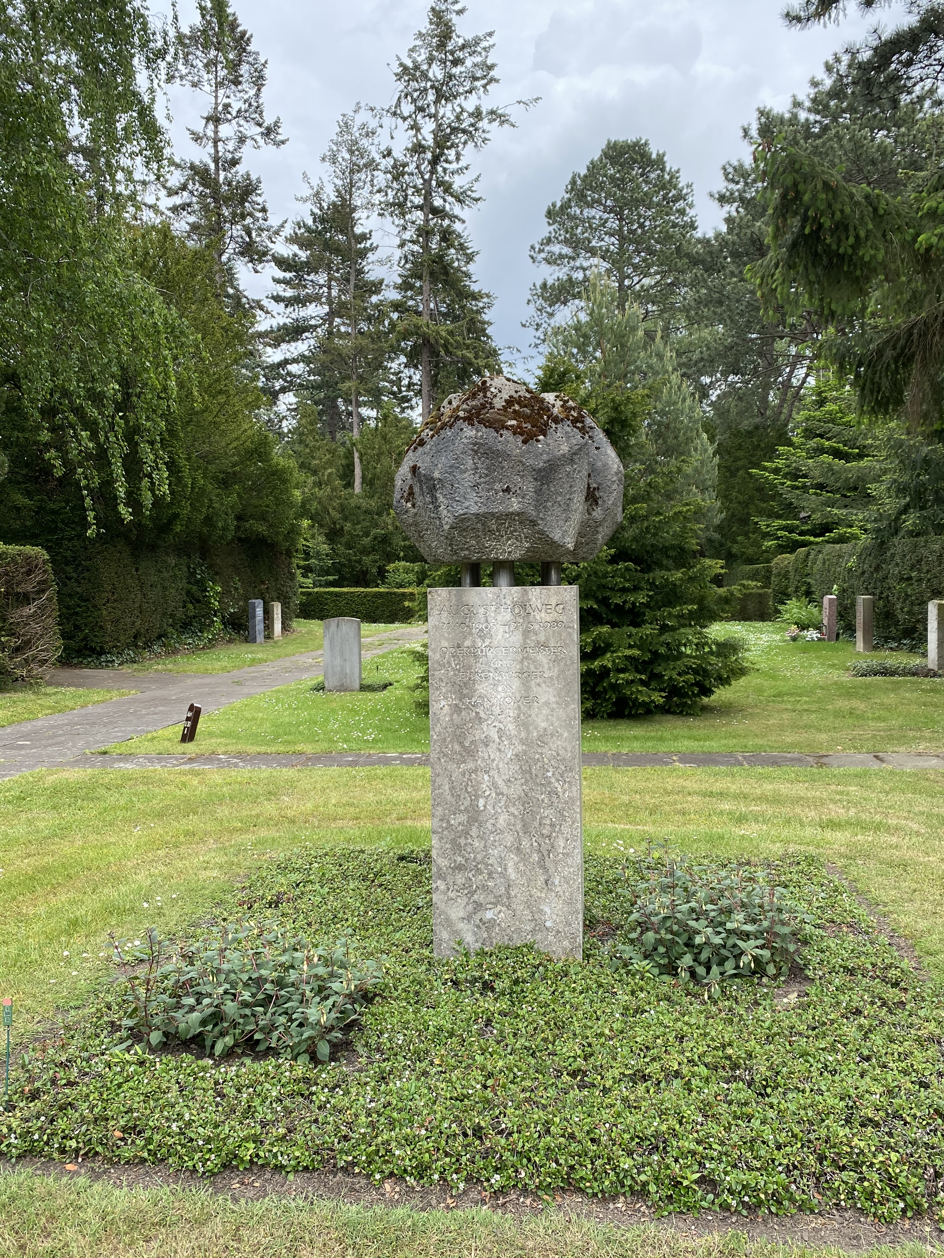 Grab des ehemaligen Oberbürgermeisters August Holwegs auf dem Stadtfriedhof Ricklingen in Hannover